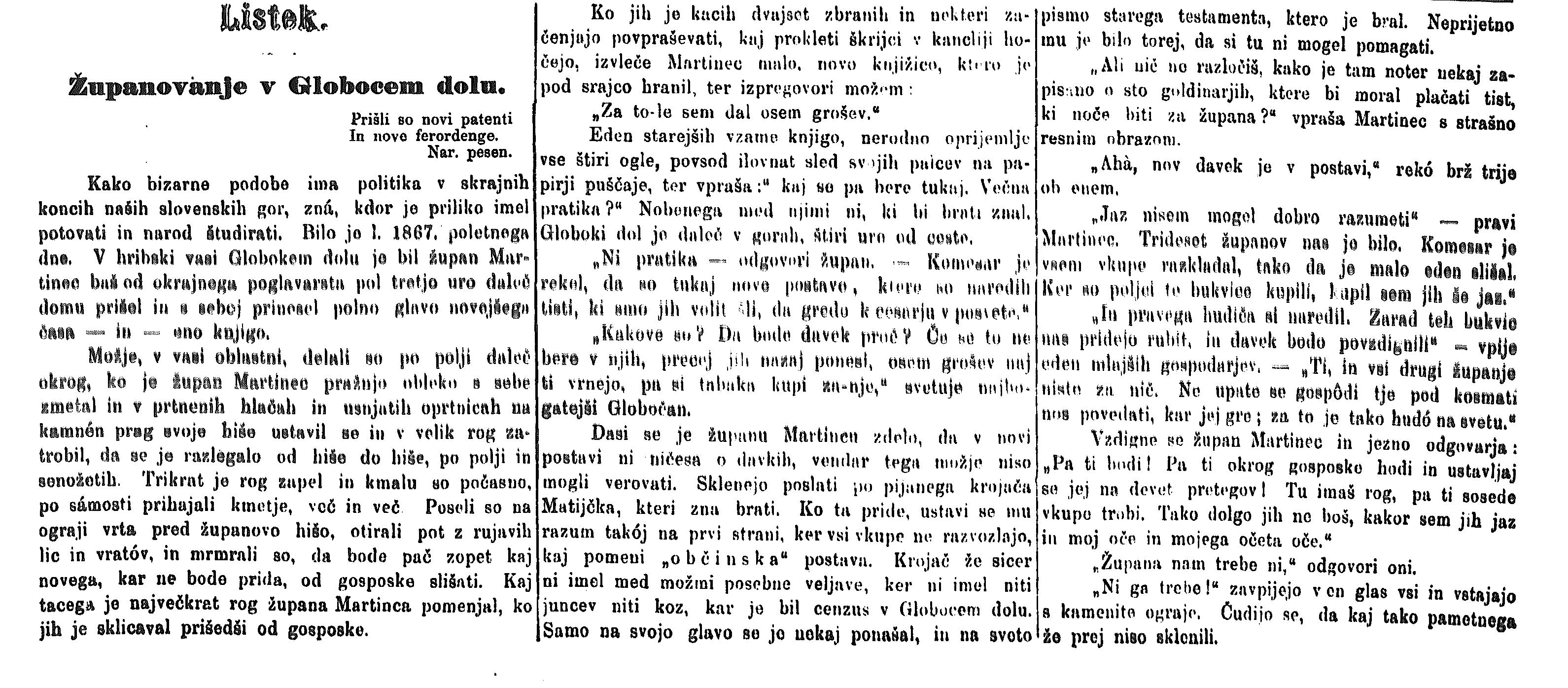 Začetek besedila Županovanje v Globokem dolu avtorja Josipa Jurčiča. Besedilo je bilo objavljeno leta 1870 v časopisu Slovenski narod.